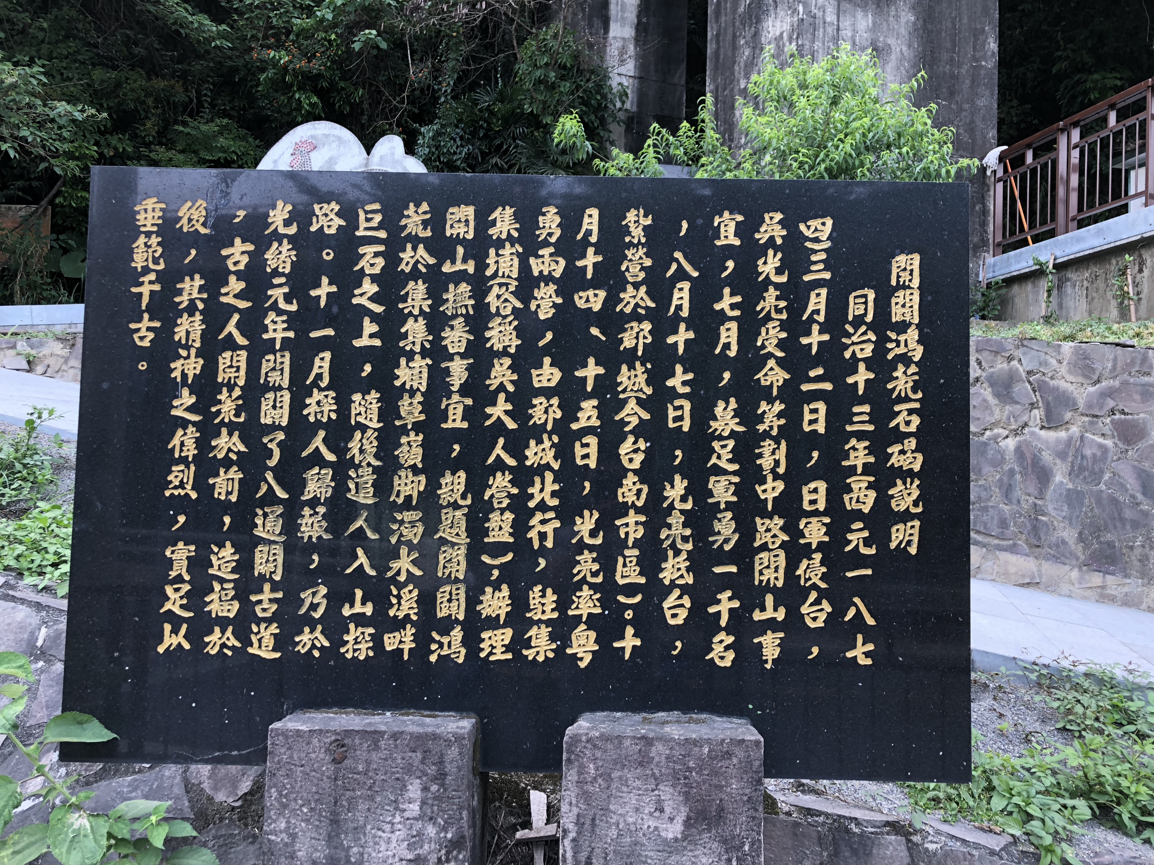 國家一級古蹟開闢鴻荒石碑說明